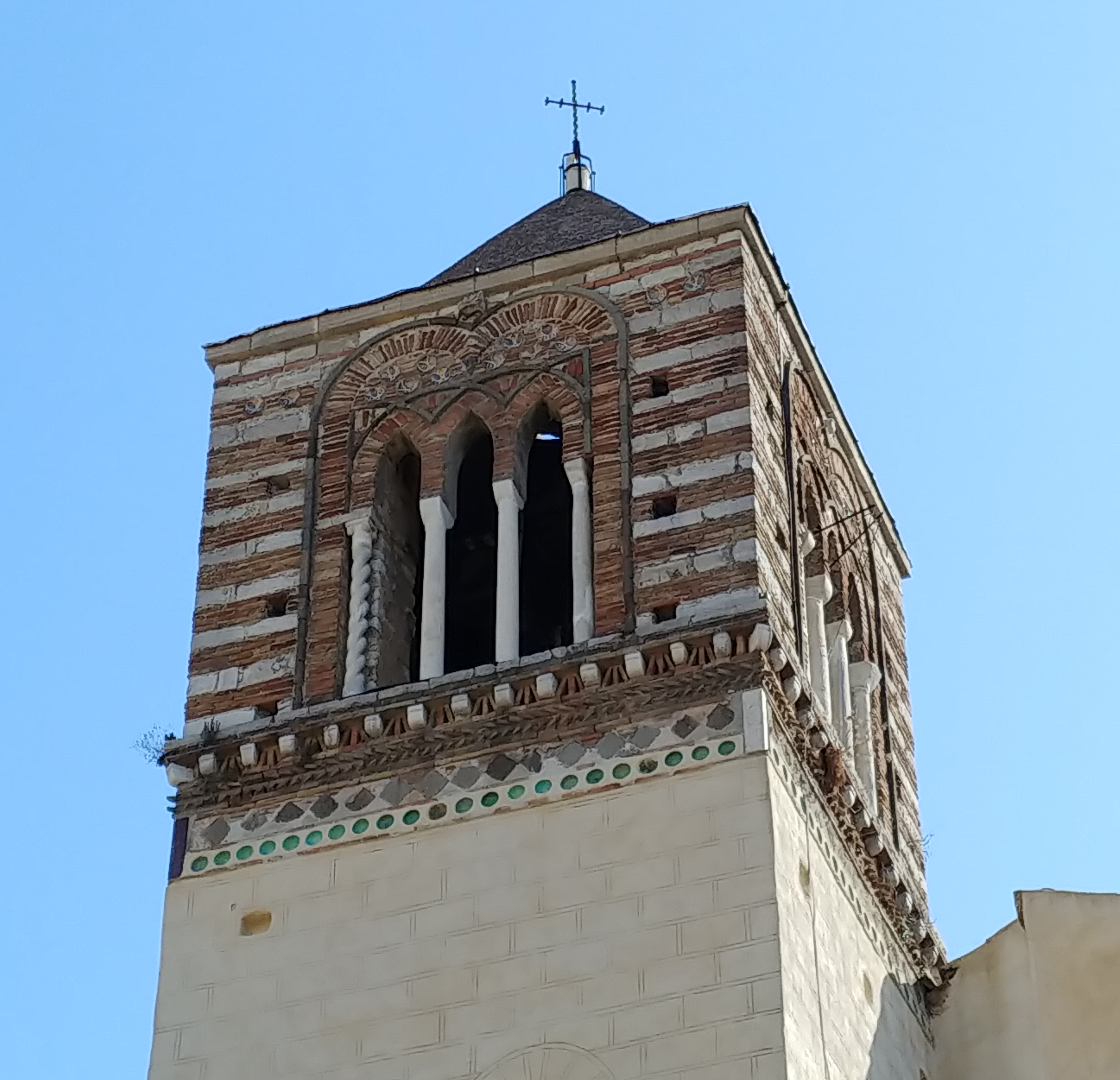 Cella campanaria.